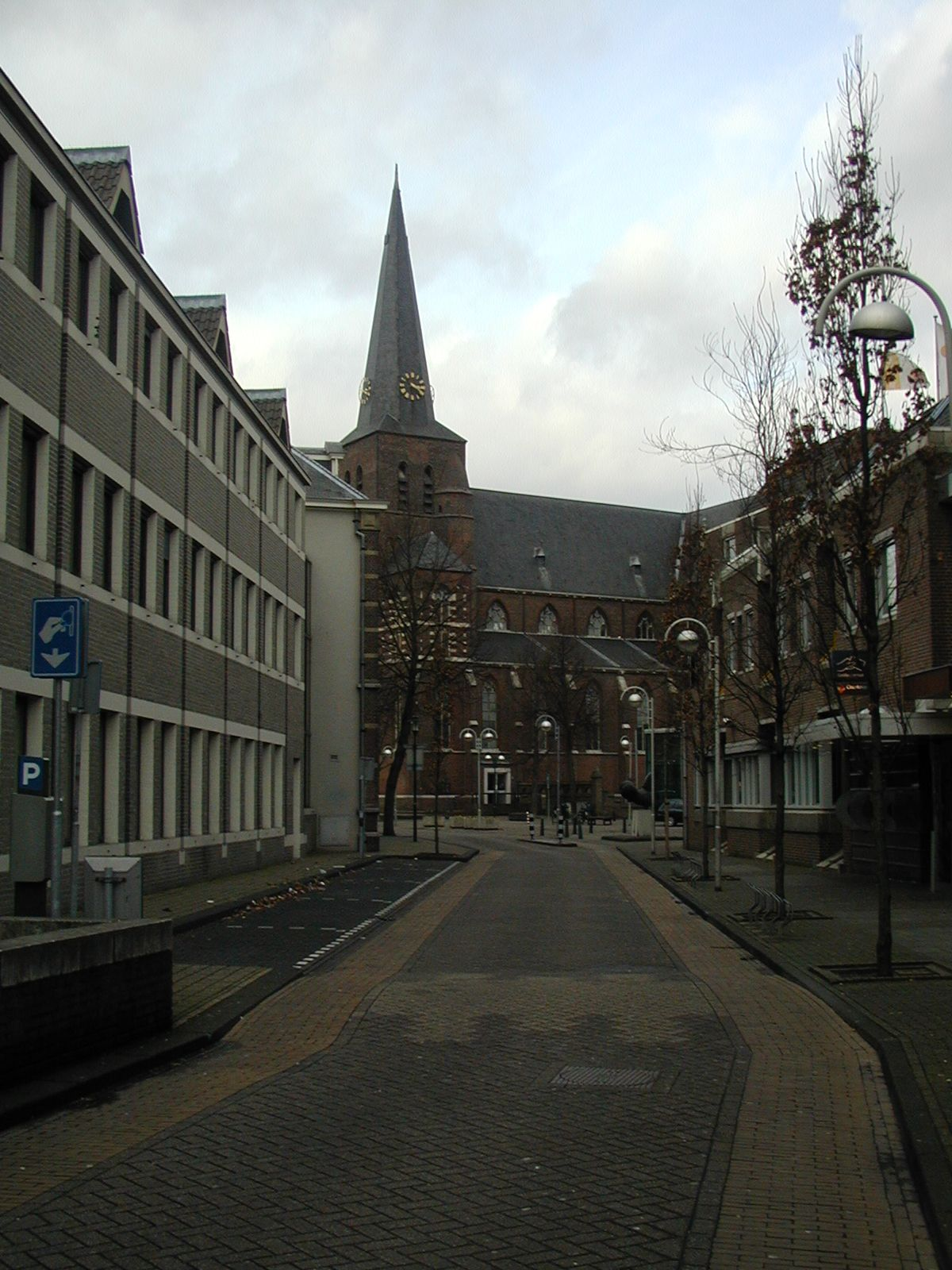 De St. Willibrorduskerk van Deurne vanuit de Martinetstraat, 1 februari 2004. Foto zelf gemaakt.